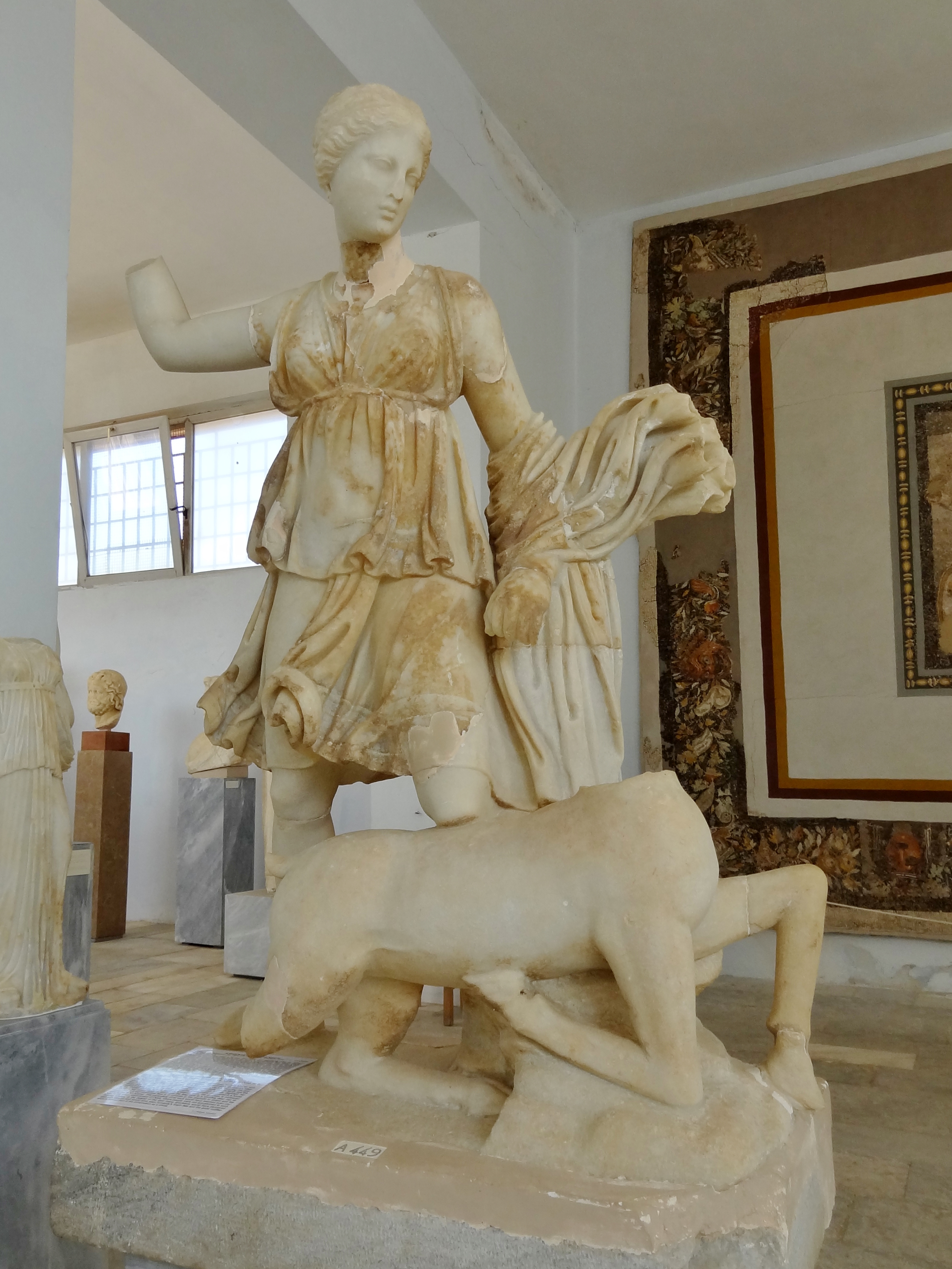 Artemis erlegt ein Wild, Skulptur aus dem Hof des Hauses III im Theater-Quartier, 125–100 v. Chr., im Museum von Delos, Kykladen, Griechenland